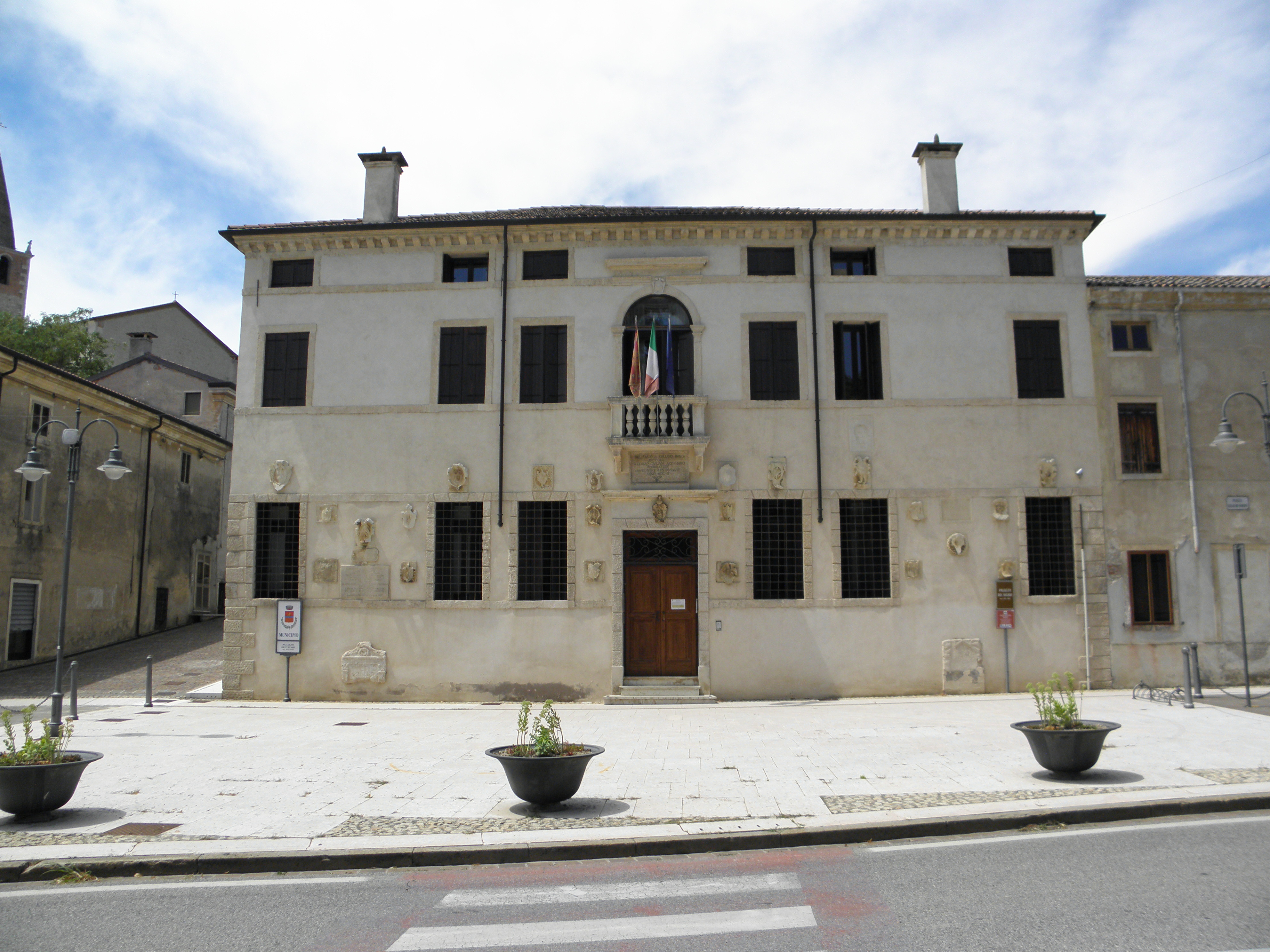 Orgiano, Villa Fracanzan, detta anche Palazzo dei Vicari, sede municipale del comune vicentino.